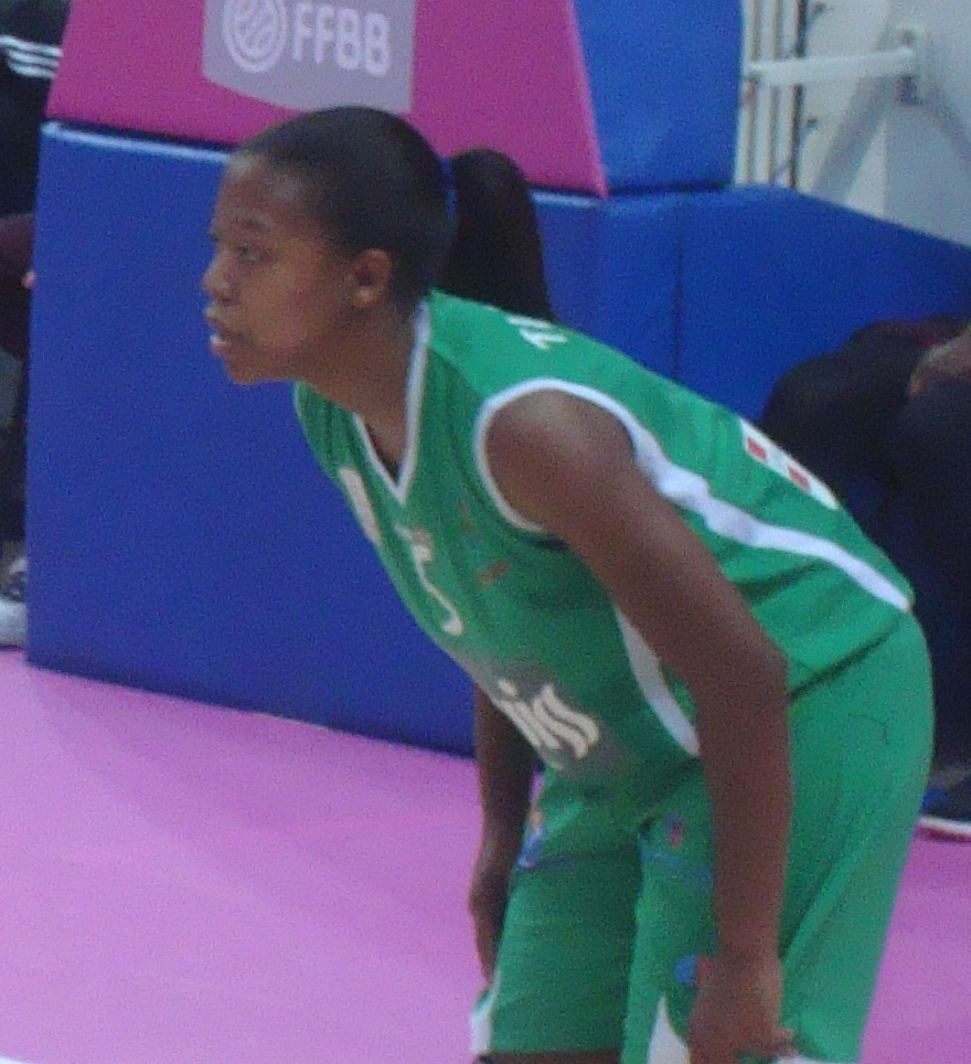 La basketteuse américaine Bianca Thomas sous le maillot de Challes.